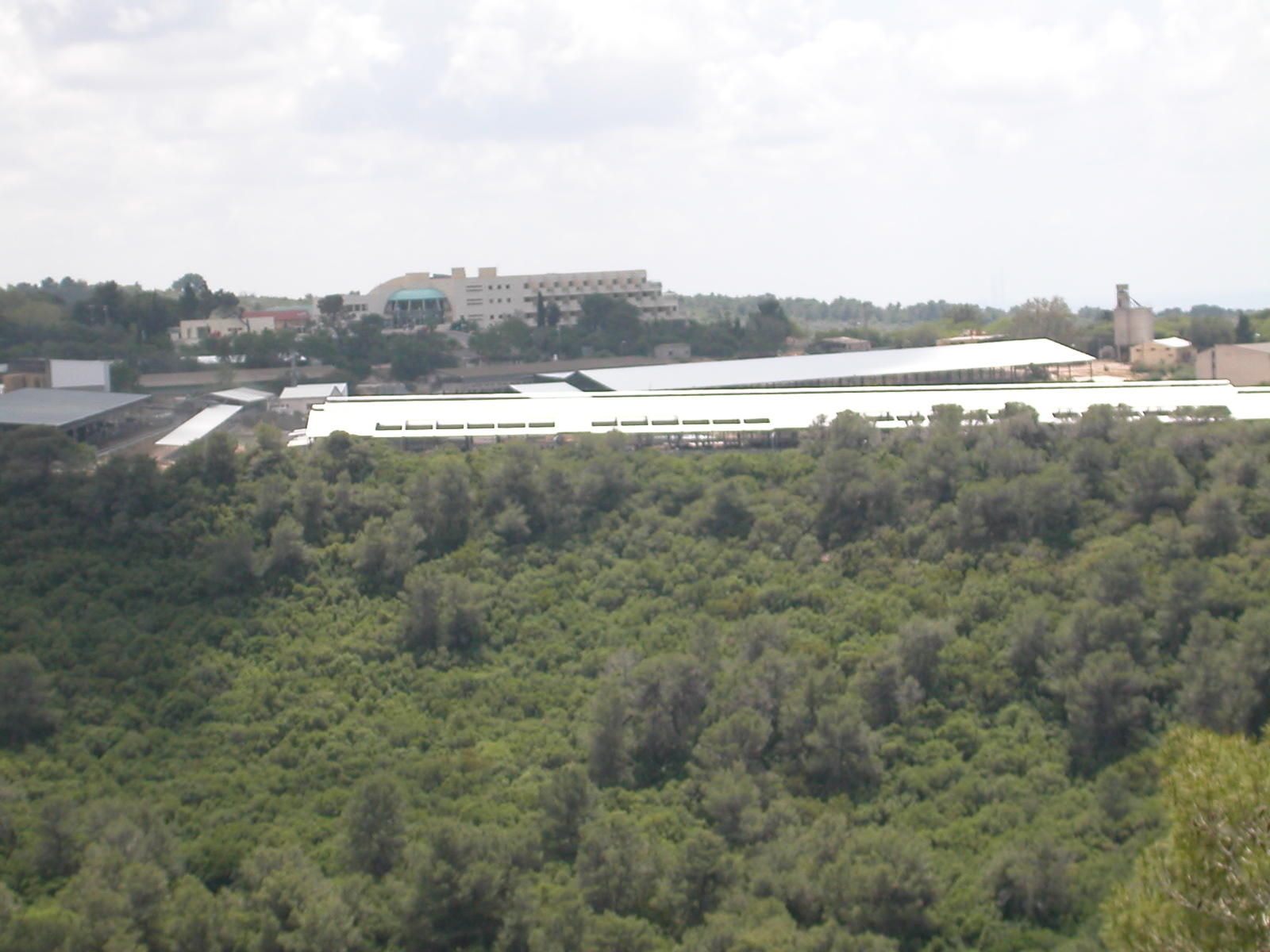 תמונה של היישוב ניר עציון שצולמה מיערות הכרמל מזרחית ליישוב. בתמונה נראים בעיקר המלון והרפת